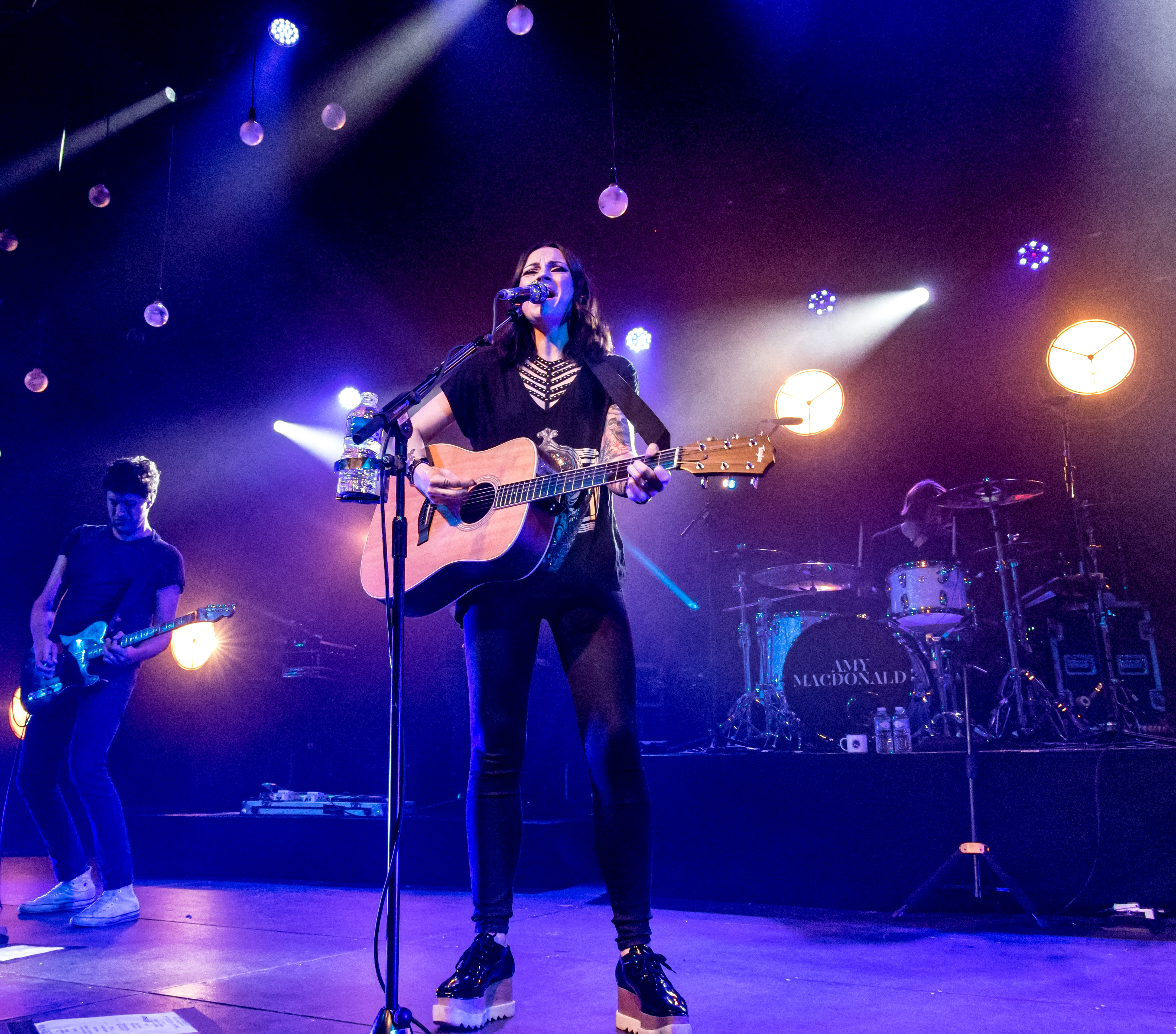 Bilder vom Zelt Musik Festival 2017 in Freiburg im Breisgau